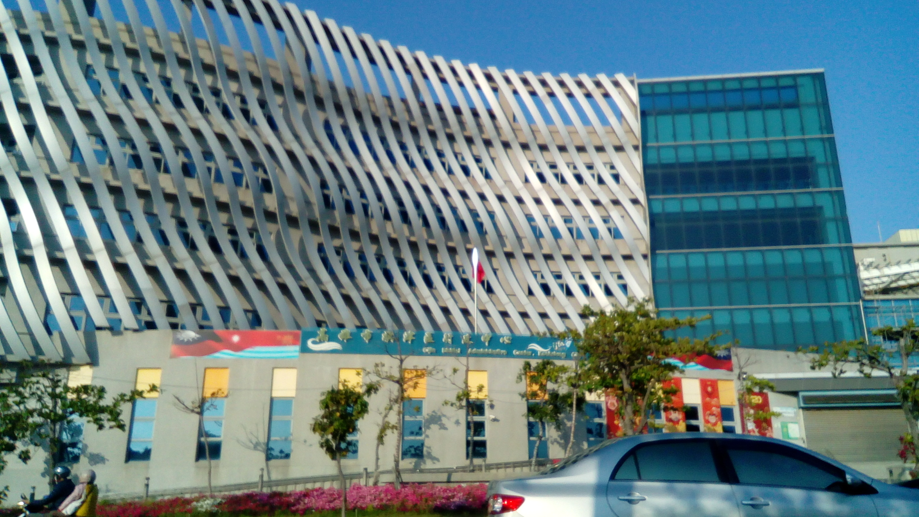 位於旗津三路二號 風車公園旁